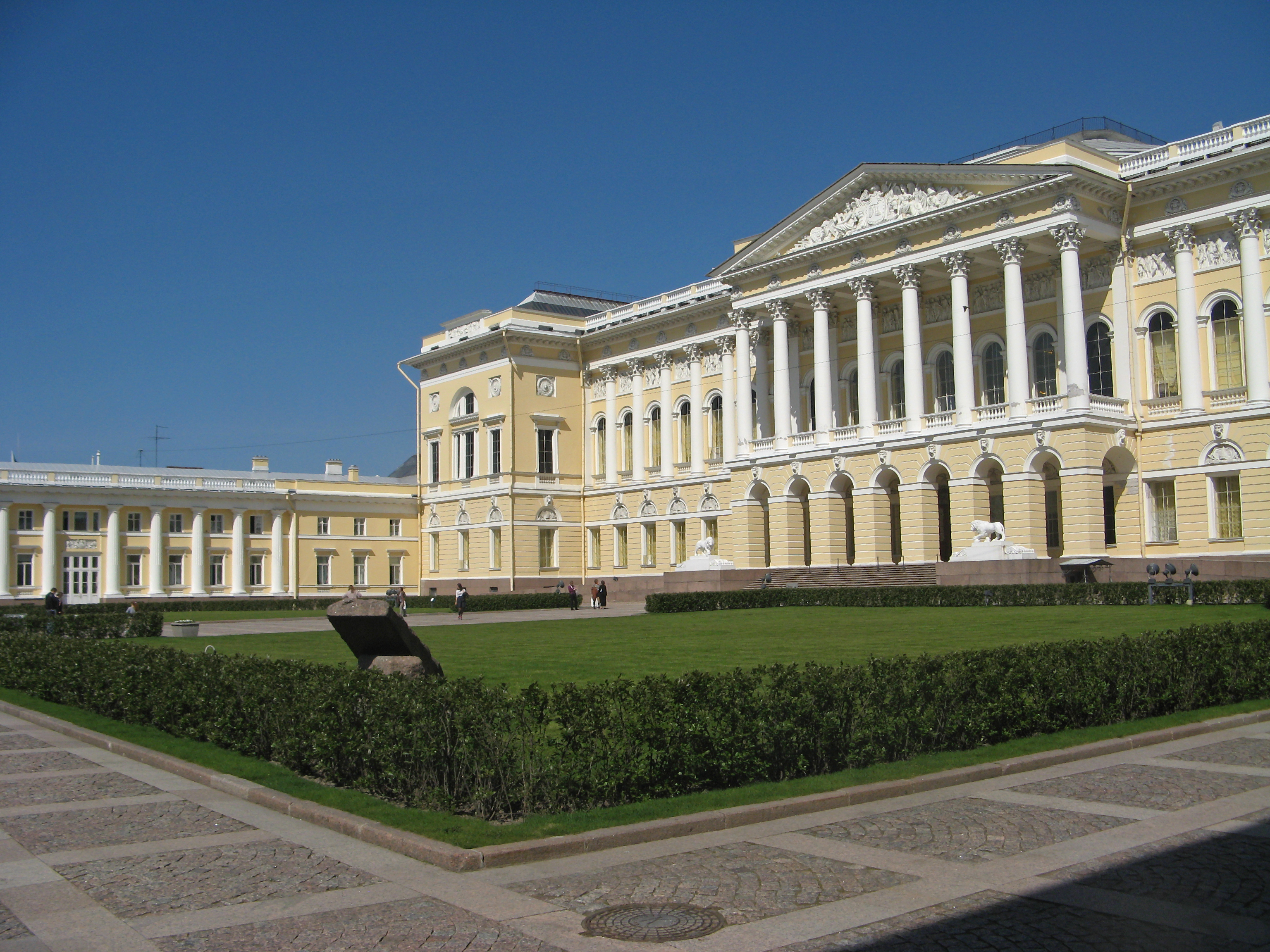 Михайловский дворец. Сад парадного двора: Инженерная улица, 4, Центральный район, Санкт-Петербург